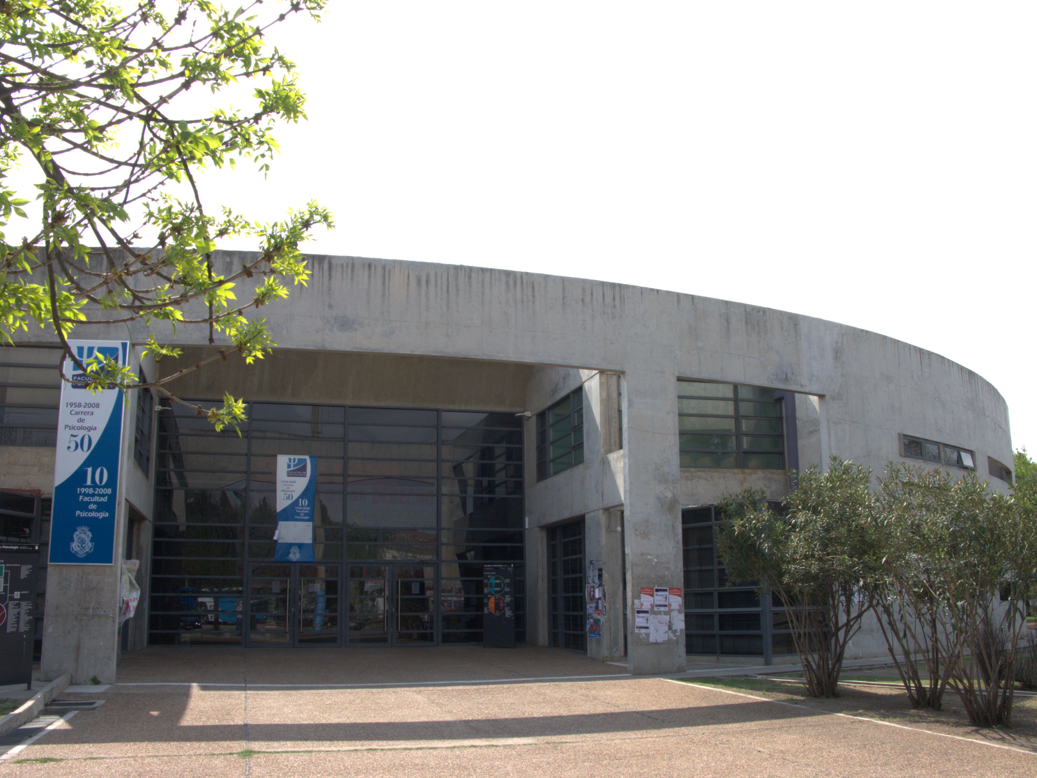 Universidad Nacional de Córdoba Facultad de Psicología Fachada principal